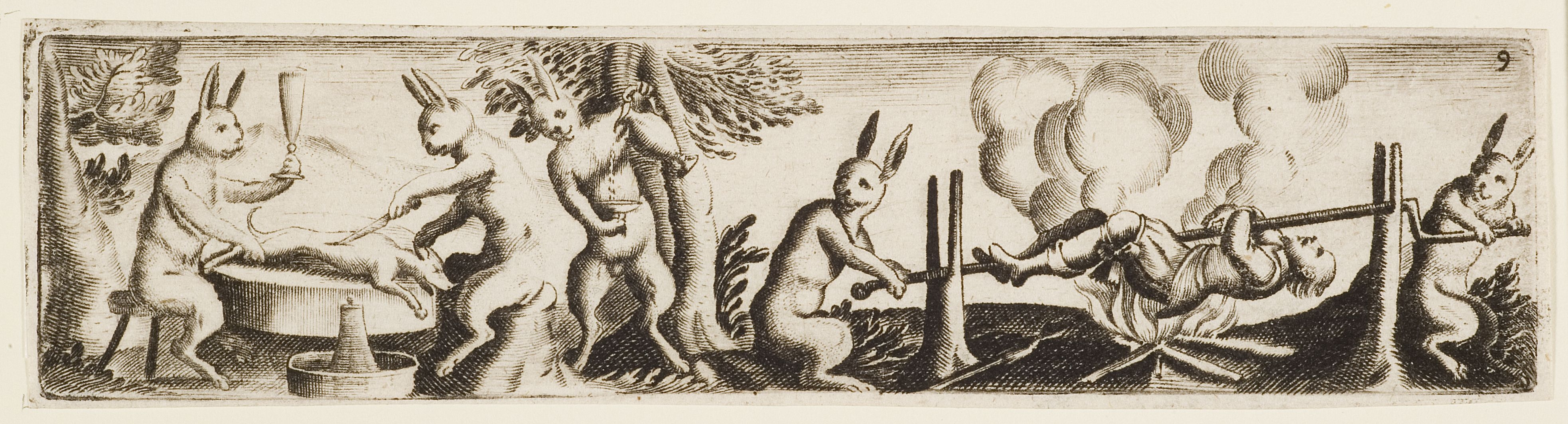 Hasen als Jäger bei der Zubereitung ihrer Beute. Herzog Anton Ulrich-Museum. Signatur HBang AB 3.28, Inv. Nr 2051. Alter Besitz, Lugt 291, 291a